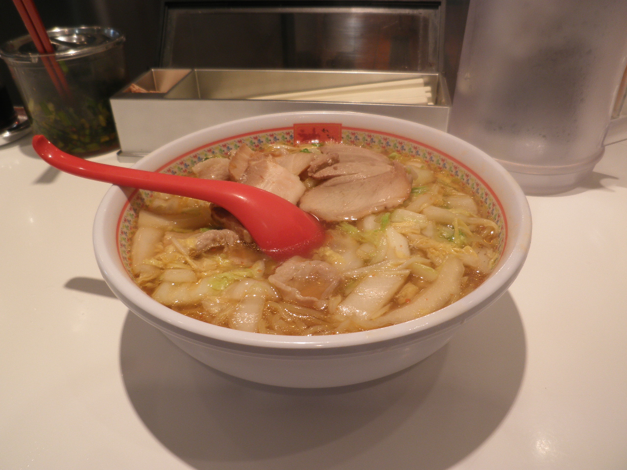 おいしいラーメン